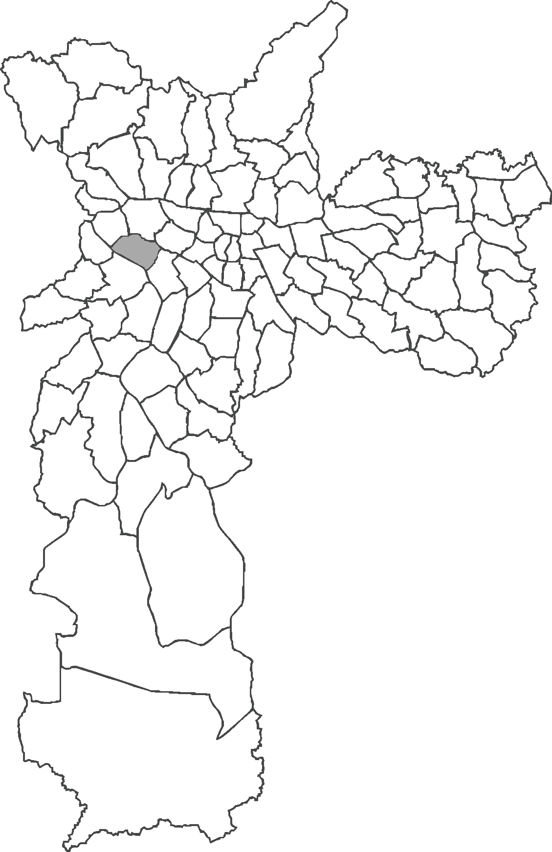 Localização do distrito de Alto de Pinheiros no município de São Paulo.